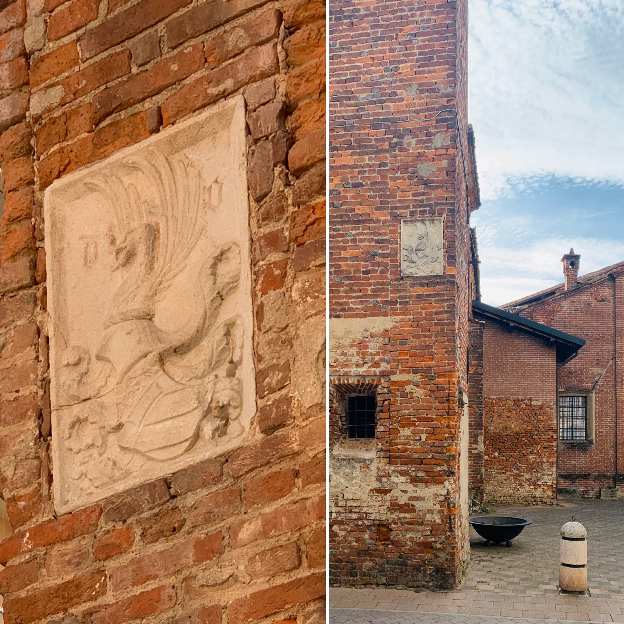 Stemmi della famiglia Maleta